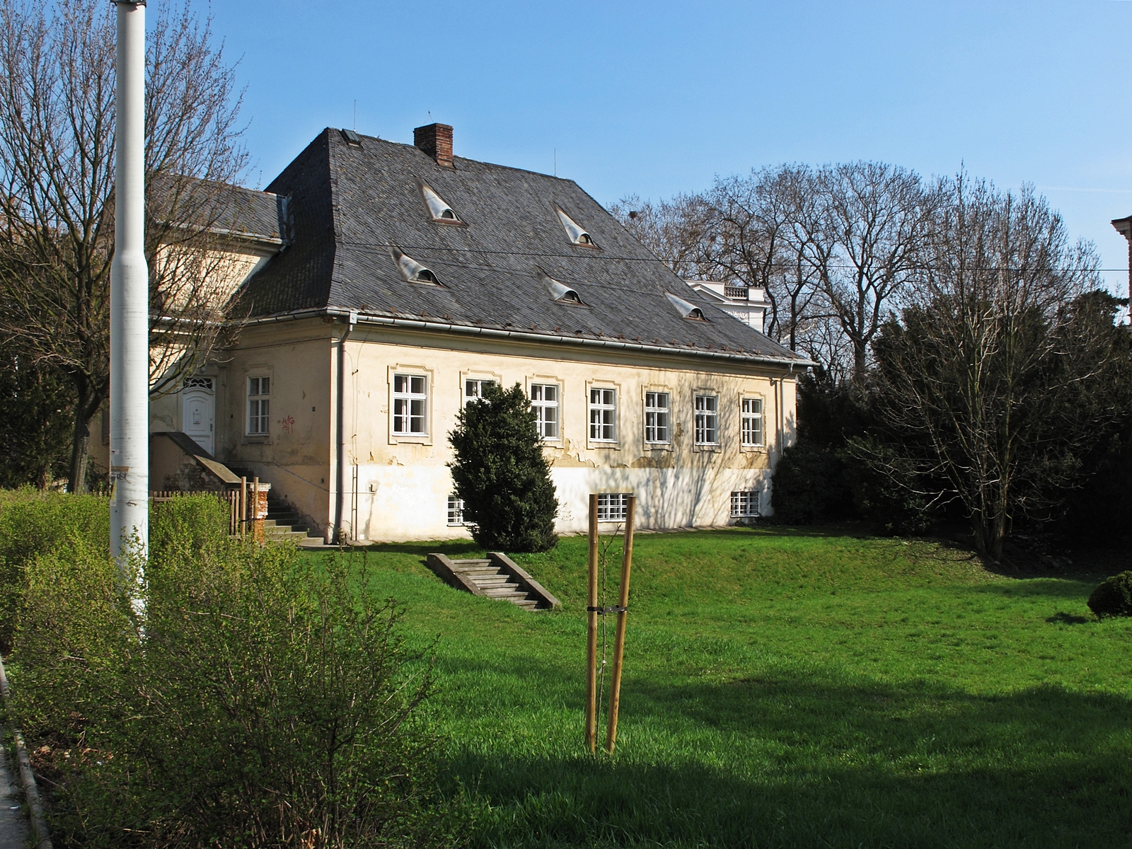 Městský dům Müllerův (Opava), Komenského 1/8, Opava